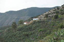 Casas de Los Berros, en la cabecera del Barranco de Valle Luis.